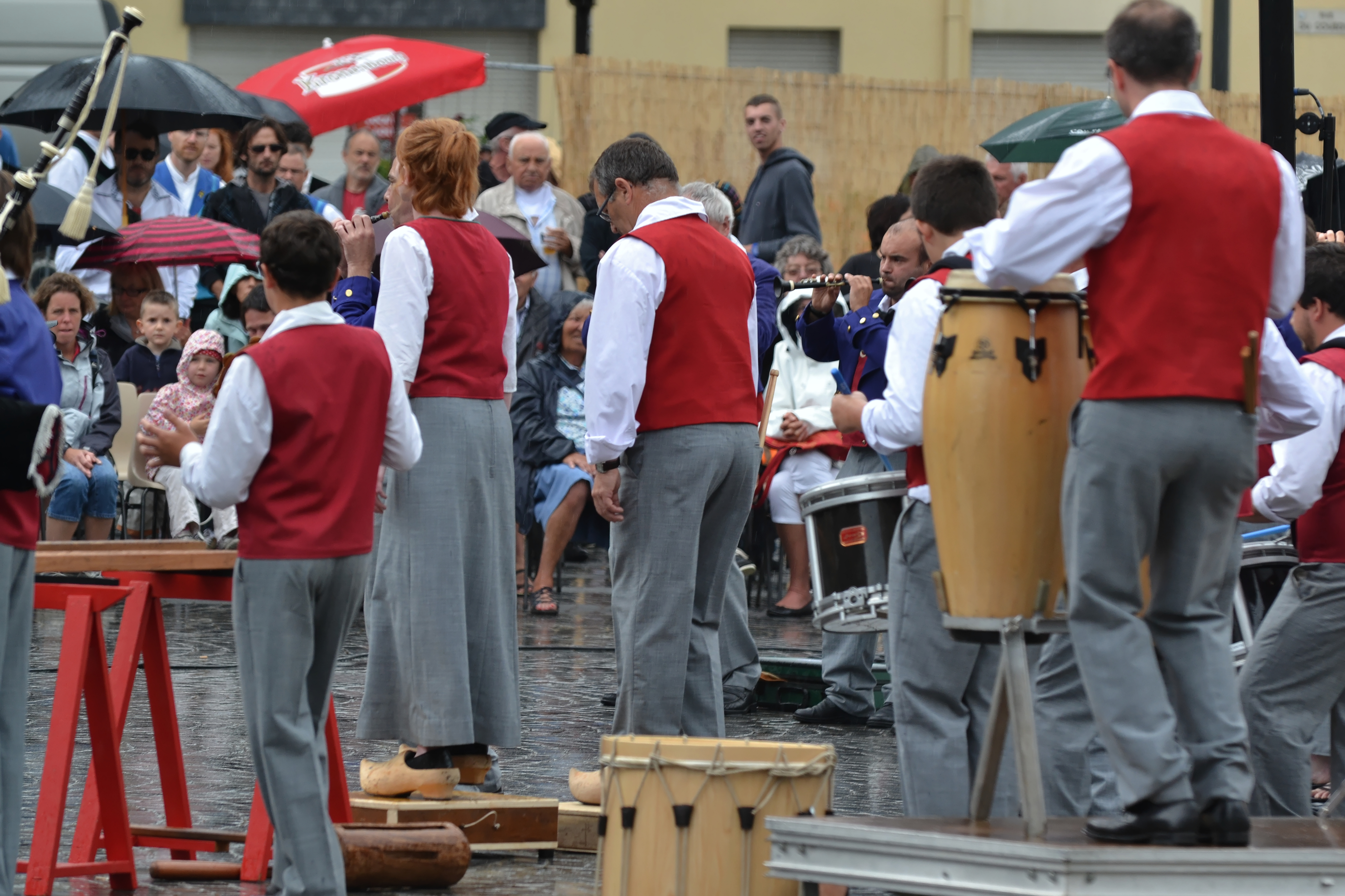 La Kevrenn Brest Sant Mark lors du championnat national des bagadoù (troisième catégorie) au Festival de Cornouaille, Esplanade François Mitterrand à Quimper, le 27 juillet 2013.